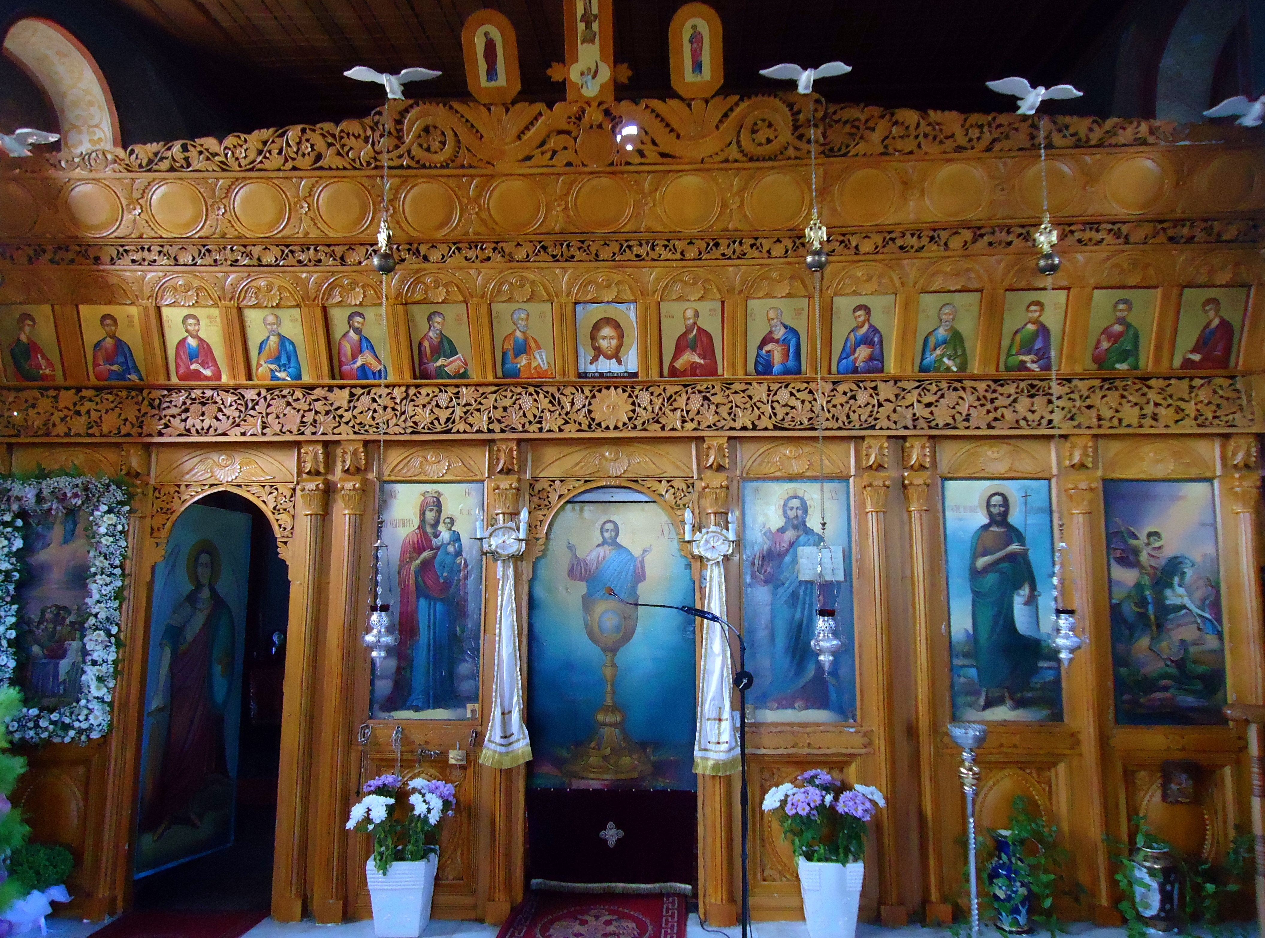 Το τέμπλο του ενοριακού ναού της Γαβριάς, το οποίο χρονολογείται από το 1928.